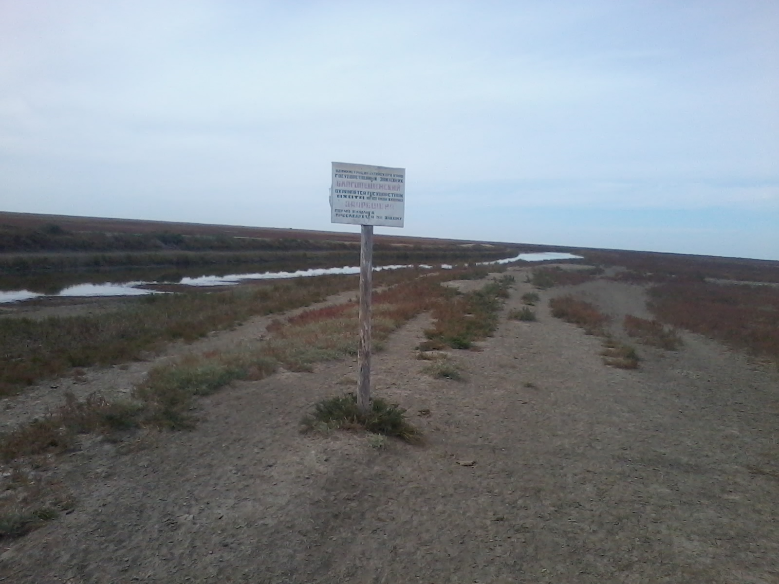 Кулундинская степь